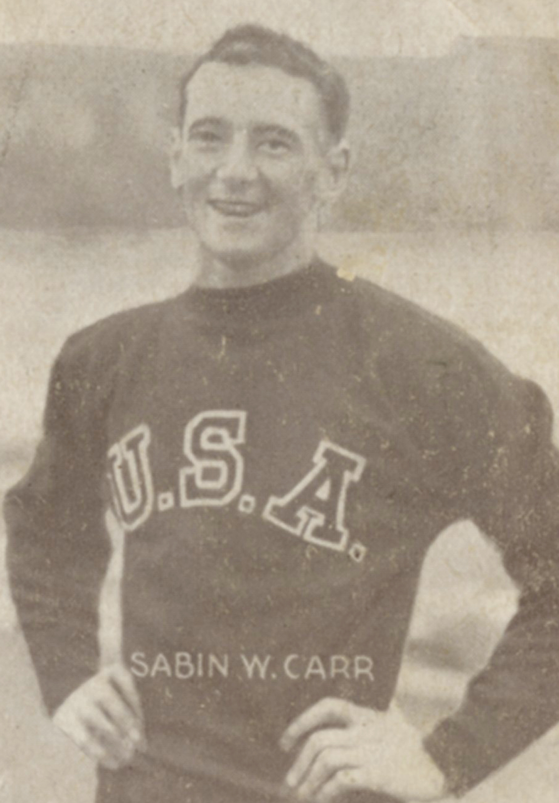 Format: Samlekort Dato / Date: ca. 1930 (dokumentet) Fotograf / Photographer: Ukjent Wikipedia: Sabin Carr (1904 - 1983) Eier / Owner Institution: Trondheim byarkiv, The Municipal Archives of Trondheim Arkivreferanse / Archive reference: Sportsklubben Freidig: Sigarettfoto ca. 1930 (Løpenr. 75) F23969 Tekst på baksiden: Sabin W. Carr, U. S. A. vandt stavspranget ved de Olympiske leke i Amsterdam med 4.20. Han har gjentagne gange før Olympiaden opnaaet endnu bedre resultat. Merknad: Disse samlekortene med bilder av norske og internasjonale idretthelter fulgte med i sigarettpakker på 1920 og 30-tallet - derav tobakksreklamen på baksiden. Samlekortene kommer fra Sportsklubben Freidigs arkiv, og inneholder nærmere 90 unike kort pent plassert i et samlealbum. Samleren var den senere skipsmegler Finn Følling (1914 – 1985).